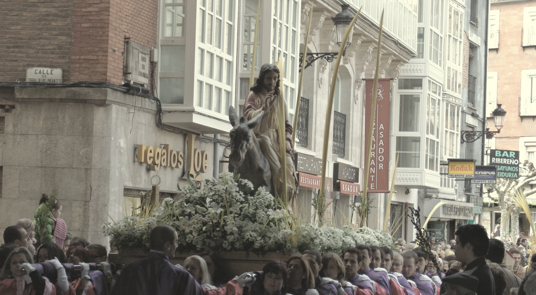 Procesión Domingo de Ramos, paso bajo Arco de Santa María, Burgos, España